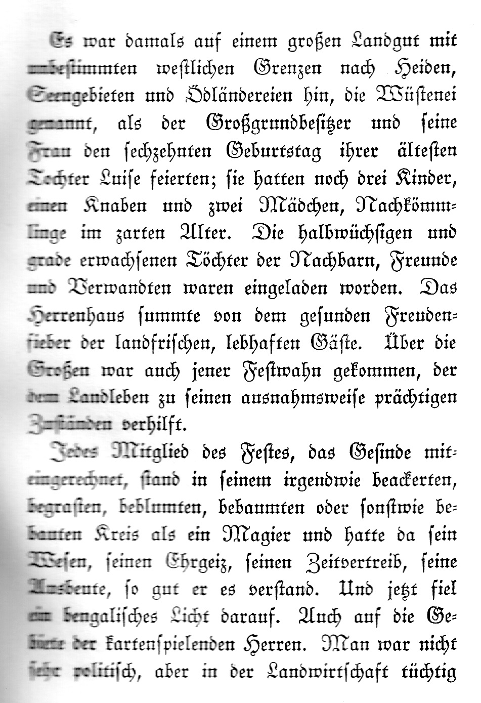 Part (beginning) of the Narrative Die Abenteuer der Oijamitza, in: Elisabeth Siewert (1867–1930), Der Sumbuddawald, Ring-Verlag, Berlin 1928.